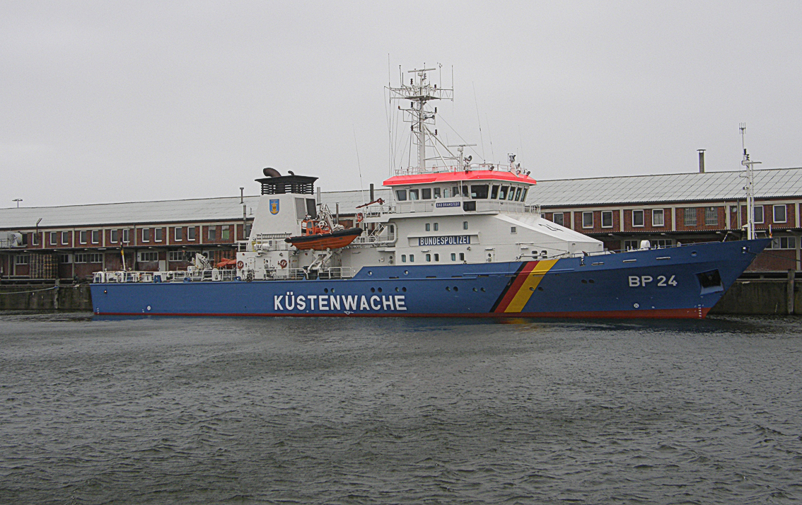 Das Schiff Bad Bramstedt der Bundespolizei